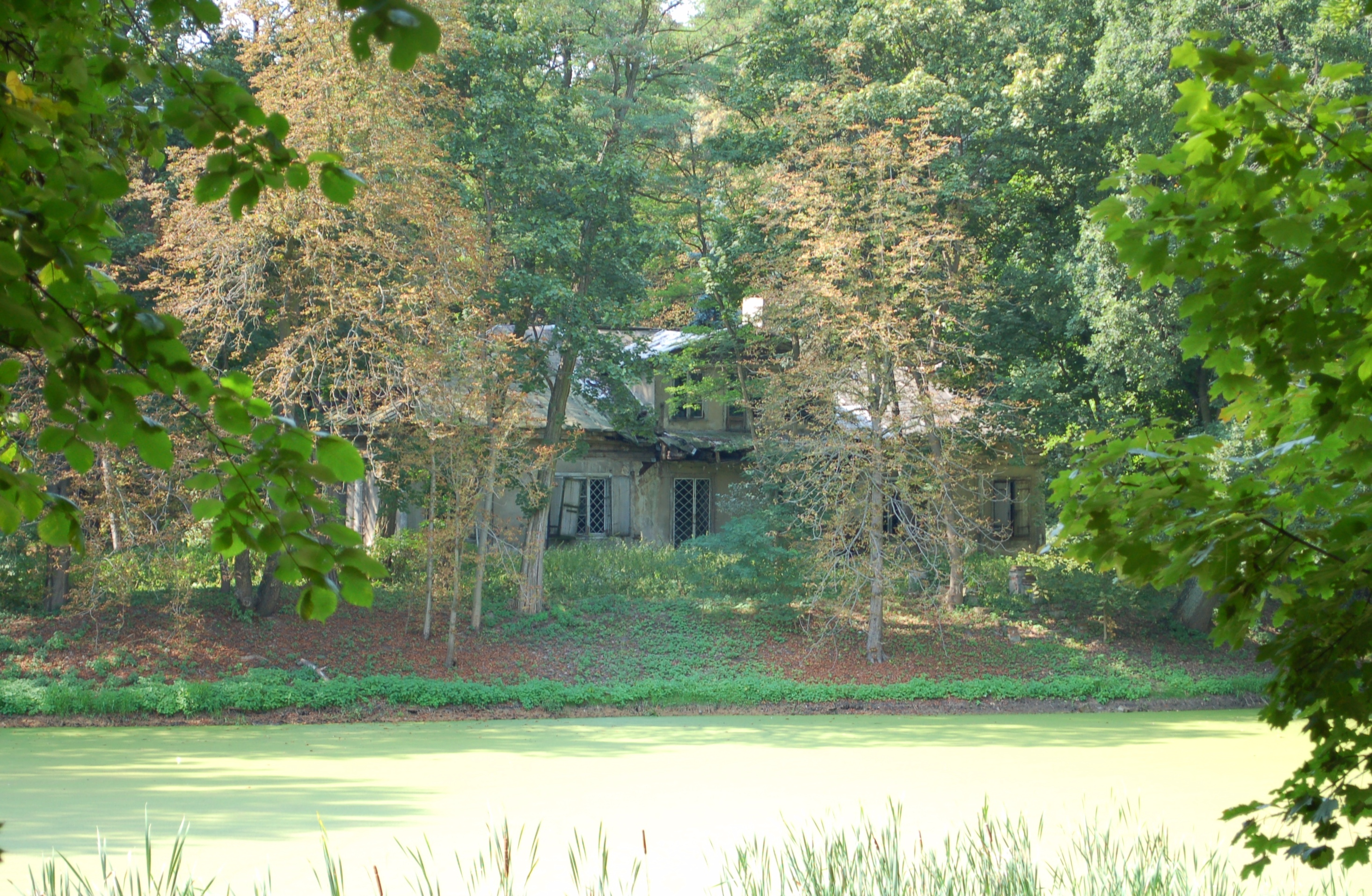 Dwór na Wyczółkach, Warszawa, Ursynów